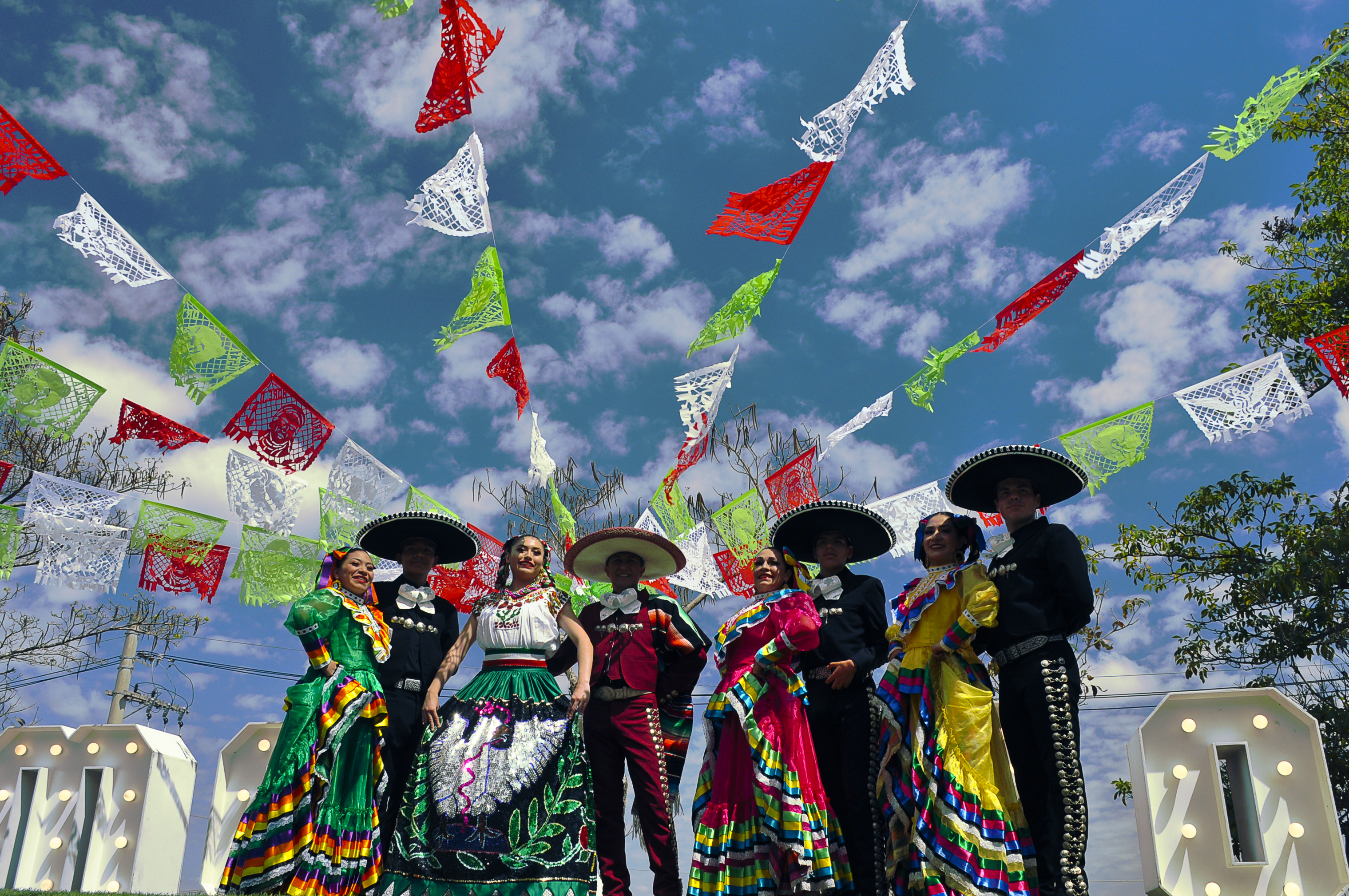 La Compañía de Danza Folklórica Soy México en uno de los eventos que fue en el el estado de São Paulo Brasil, en la ciudad de Vinhedo, donde el grupo danzo los sons jalisienses. This photo has been taken in the country: Mexico